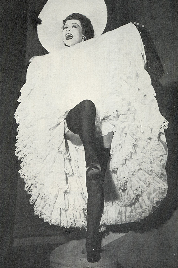 Stina-Britta Melander i Glada änkan på Stora Teatern, Göteborg